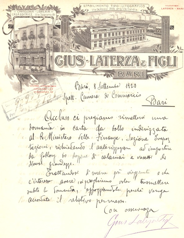 Lettera commerciale della ditta di Bari Giuseppe Laterza & Figli su carta intestata che riproduce lo stabilimento e il negozio, Bari 8 settembre 1920 (AS Bari, Fondo Camera di commercio di Bari, I dep., b. 299, 1920)